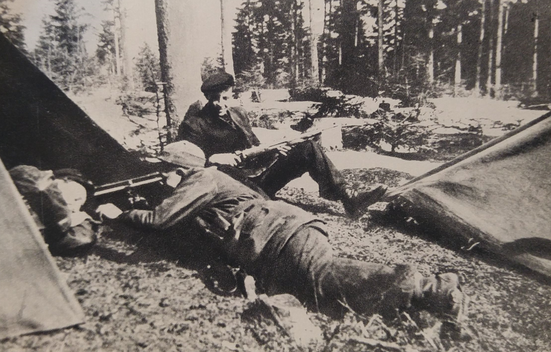 OP-11 Biwak lata 1943-1944, autor nieznany, opublikowane na terenie Polski przed 1994 rokiem ("Z walk na Podkarpaciu" PAX 1971).